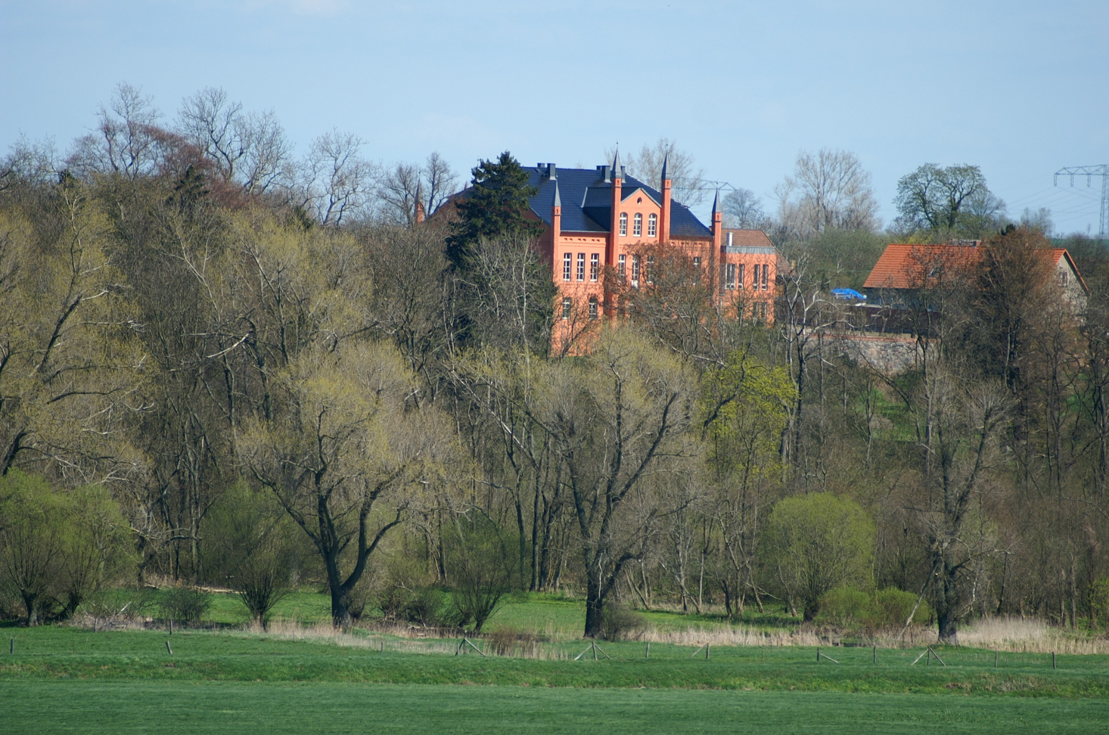 Blick über das Tollensetal zum Gutshaus Wietzow, Landkreis Demmin, Mecklenburg-Vorpommern